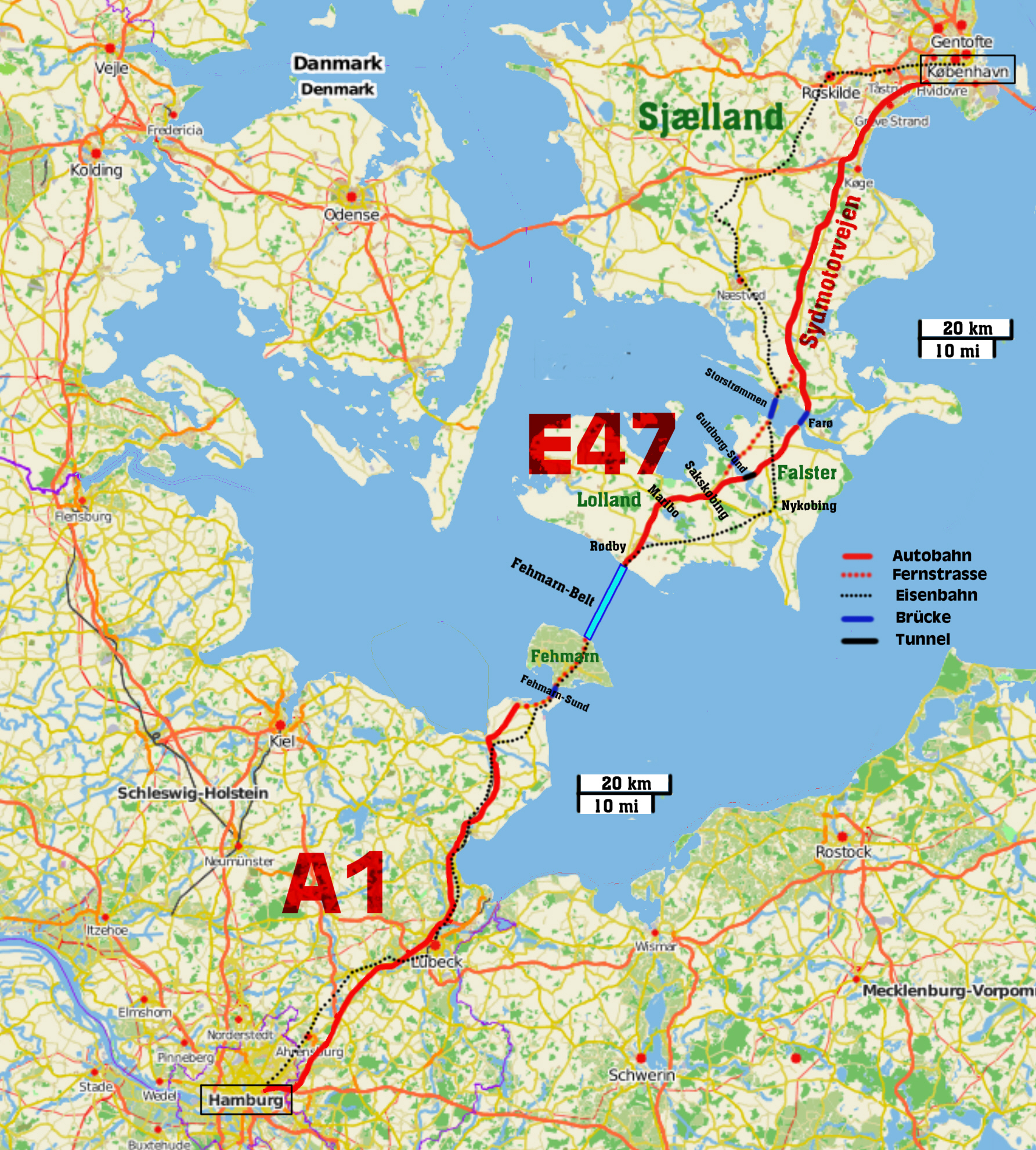 Vogelfluglinie - Verlauf von Straßen- und Eisenbahnverbindungen in 2011